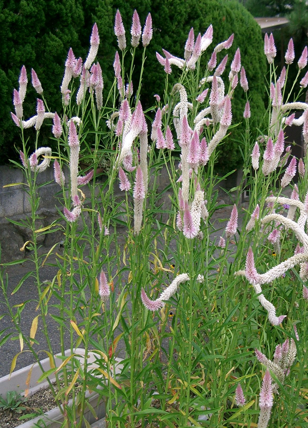 Celosia argentea